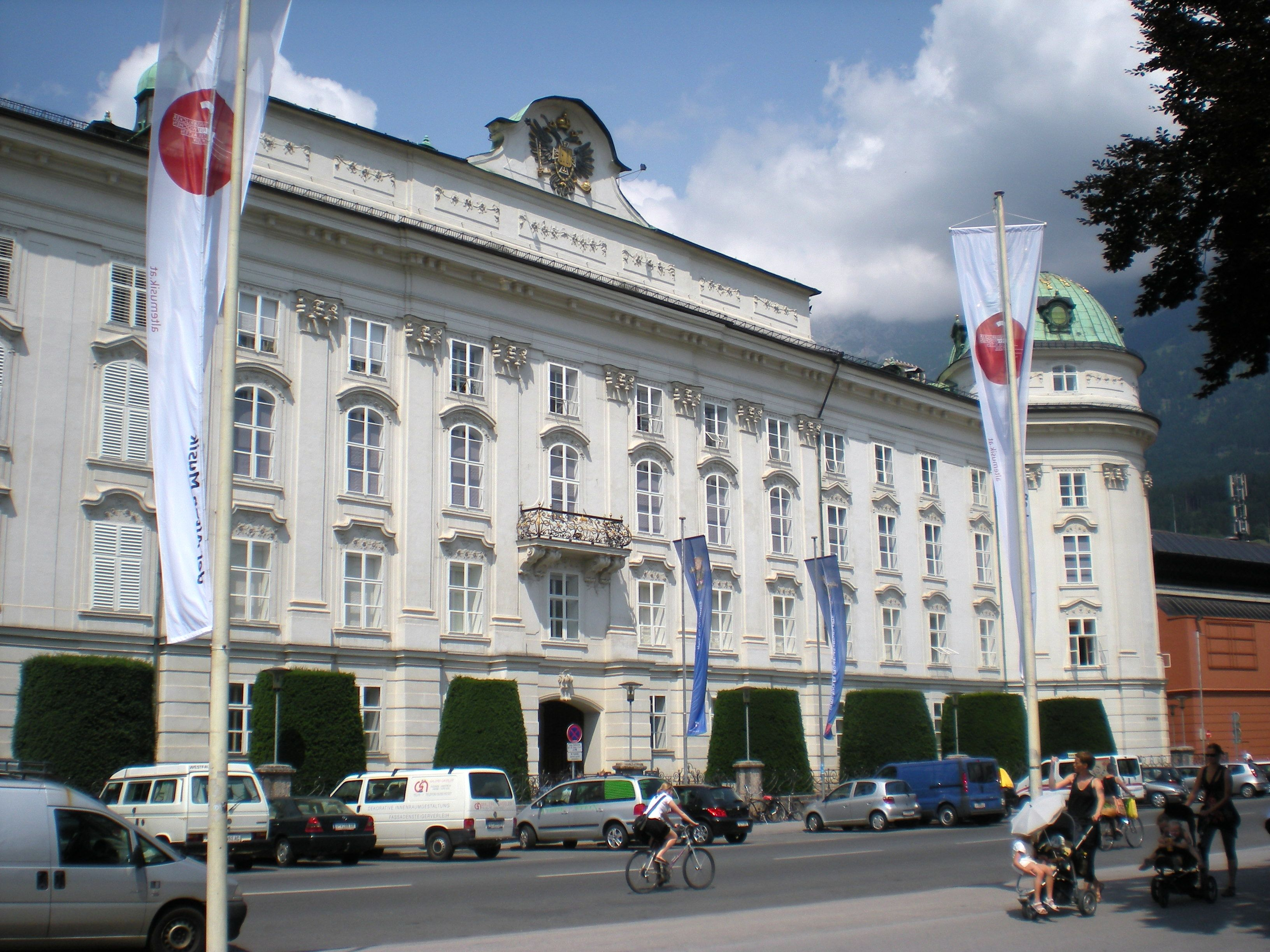 Fachada del Hofburg (Innsbrück) orientada a la calle Rennweg.